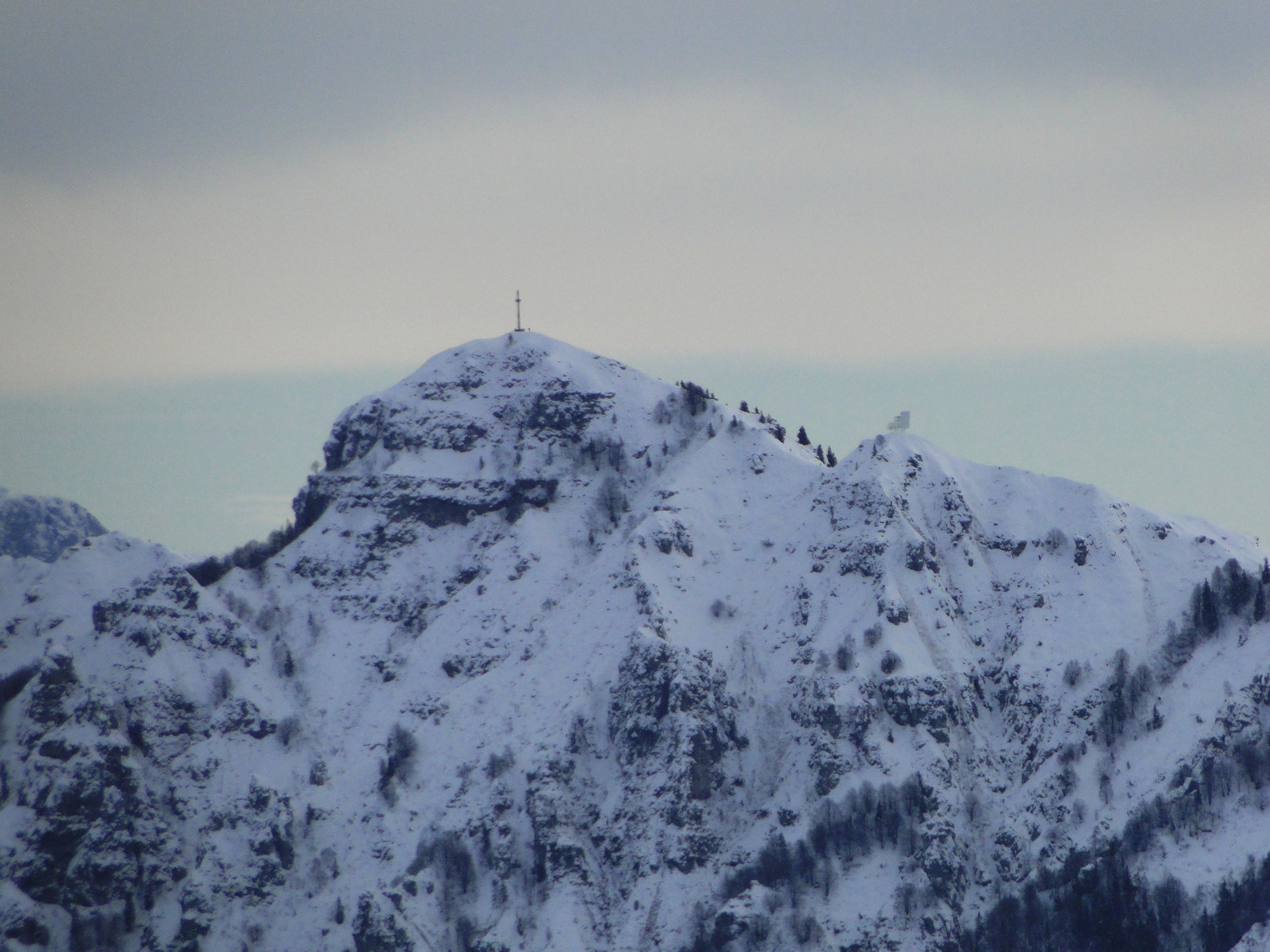 Il pizzo Formico visto dalla cima di Grem